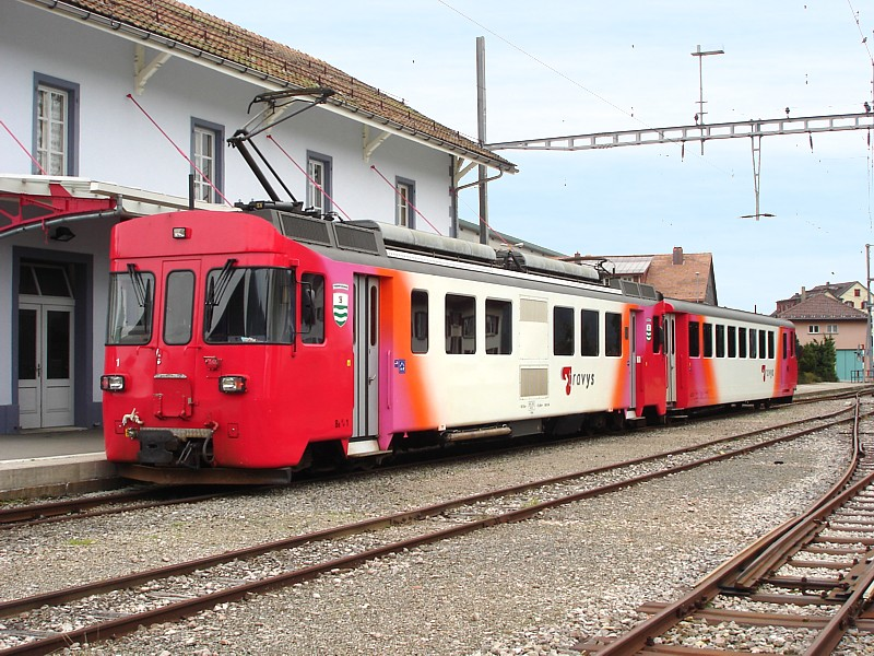 Be 4/4 1 de l'YSteC dans sa nouvelle livrée TRAVYS